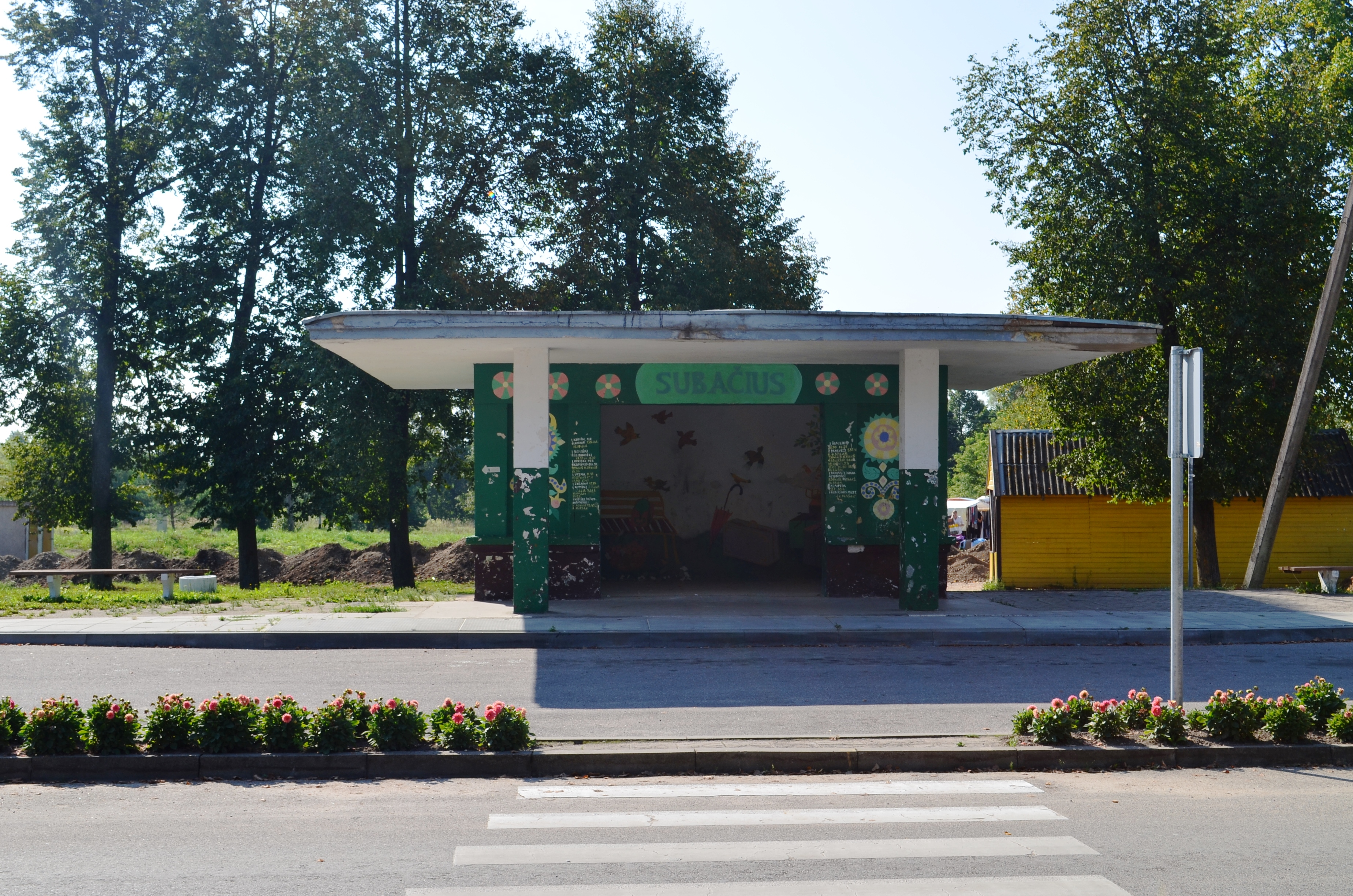 Autobusų stotelė, Subačius, Kupiškio r.